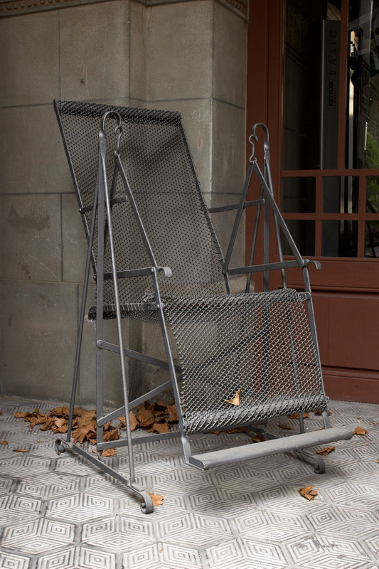 Forja. Silló basculant (la Garriga-Vallès Oriental-Catalunya), obra de Manuel Raspall c.1920